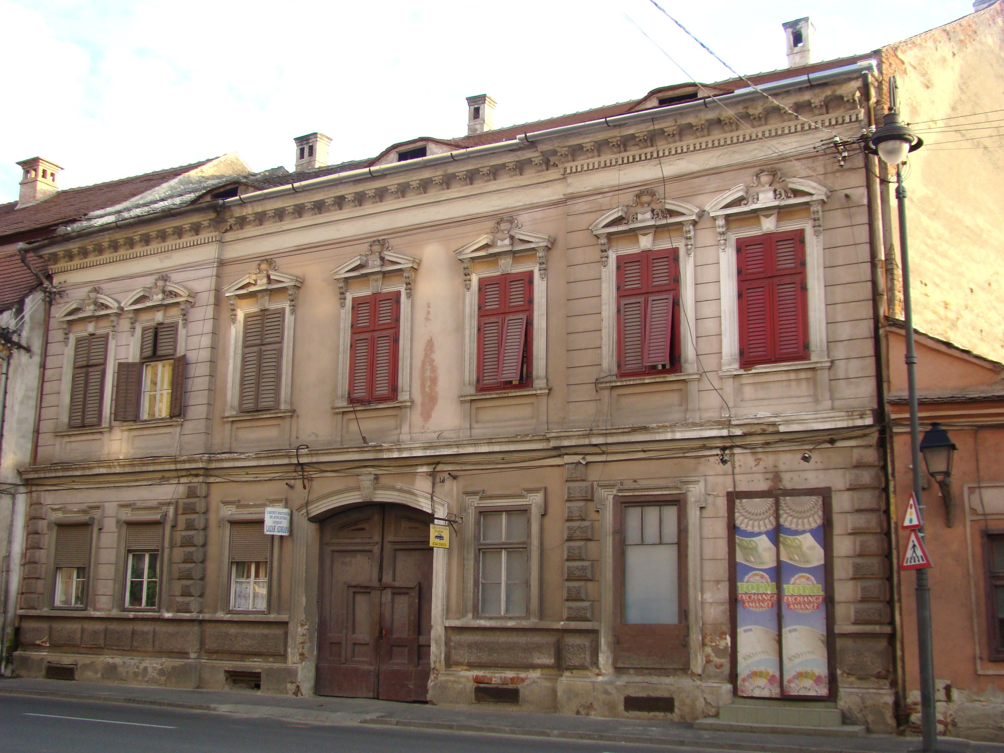 Clădire monument istoric, str.Andrei Șaguna, nr.7